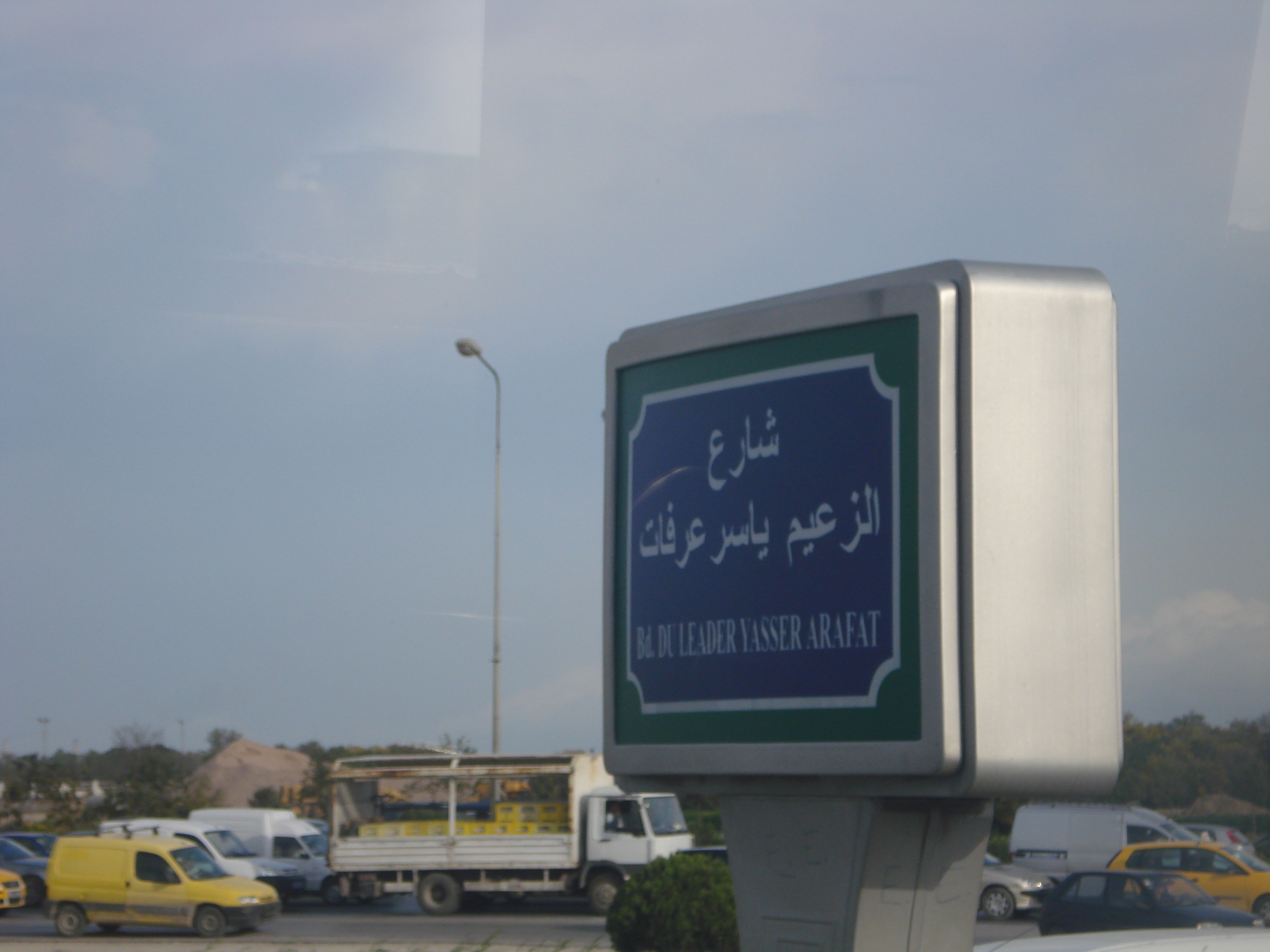 Plaque du boulevard du leader Yasser Arafat à Tunis